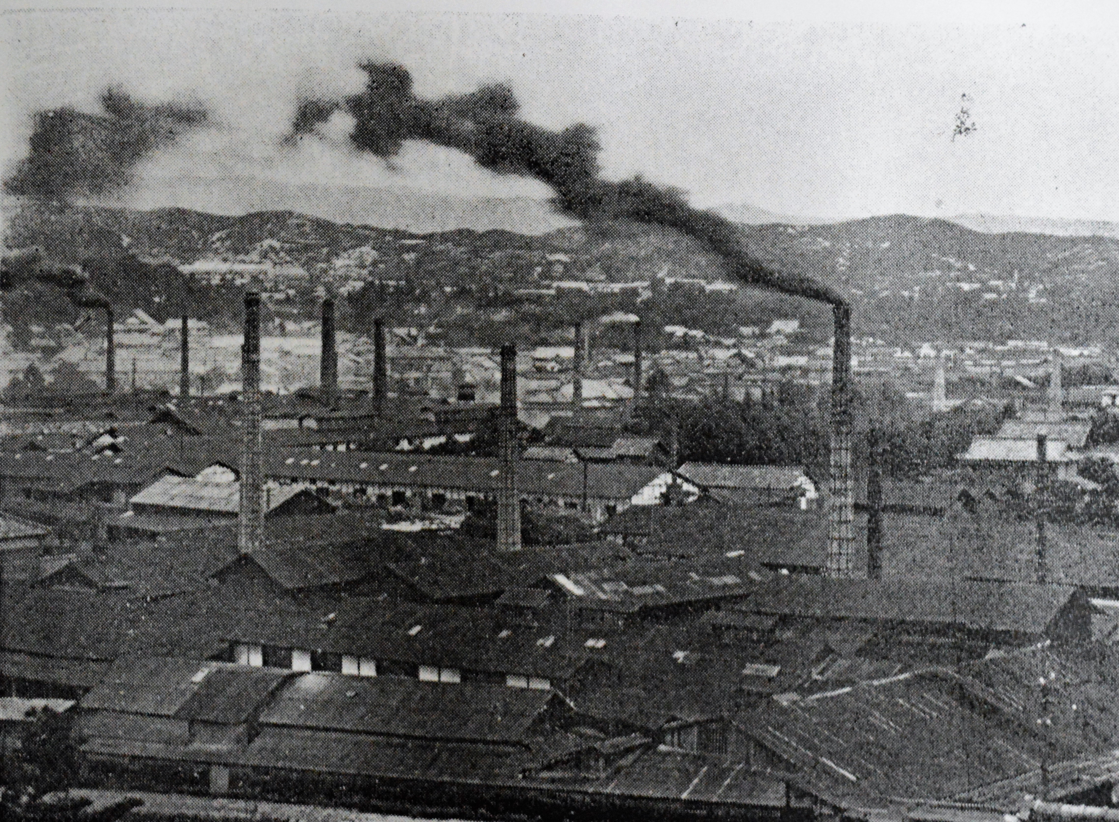 多治見市の工場地帯の全景。